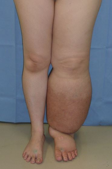 lower limb lymphedema